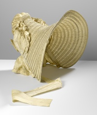 Luifelhoed van gele tafzijde. De luifel is rondom verstevigd met drie laitondraden naast elkaar. In de luifel zijn verder 20 laitondraden in tunnels genaaid; twee aan twee met een cm tussen ieder stel.